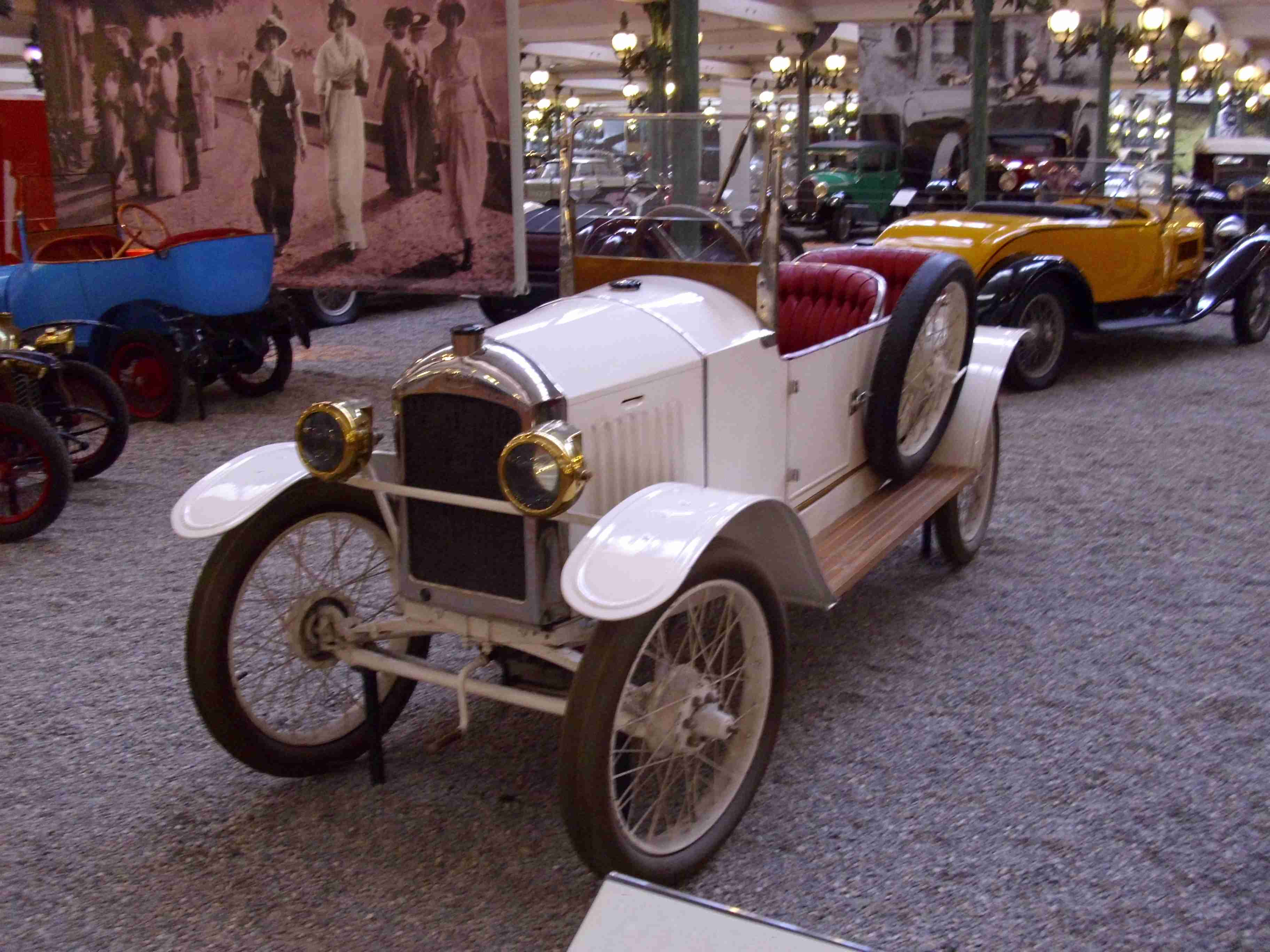 Peugeot Type 161 1922